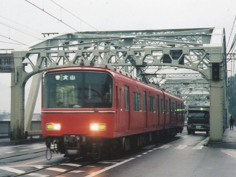 Nagoya Railroad EMU type 6000 At Inuyama-Yuen Sta. (Inuyama Bridge)